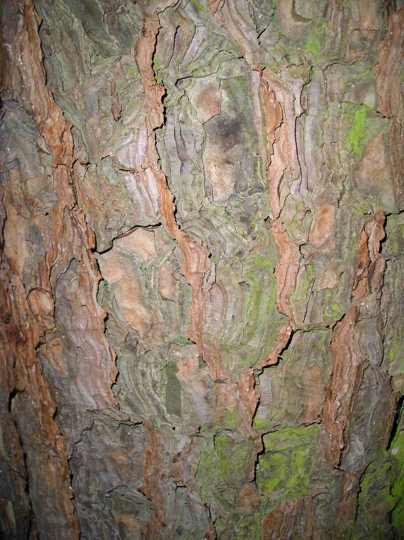 Vue en très gros plan de l’écorce d'un arbre.